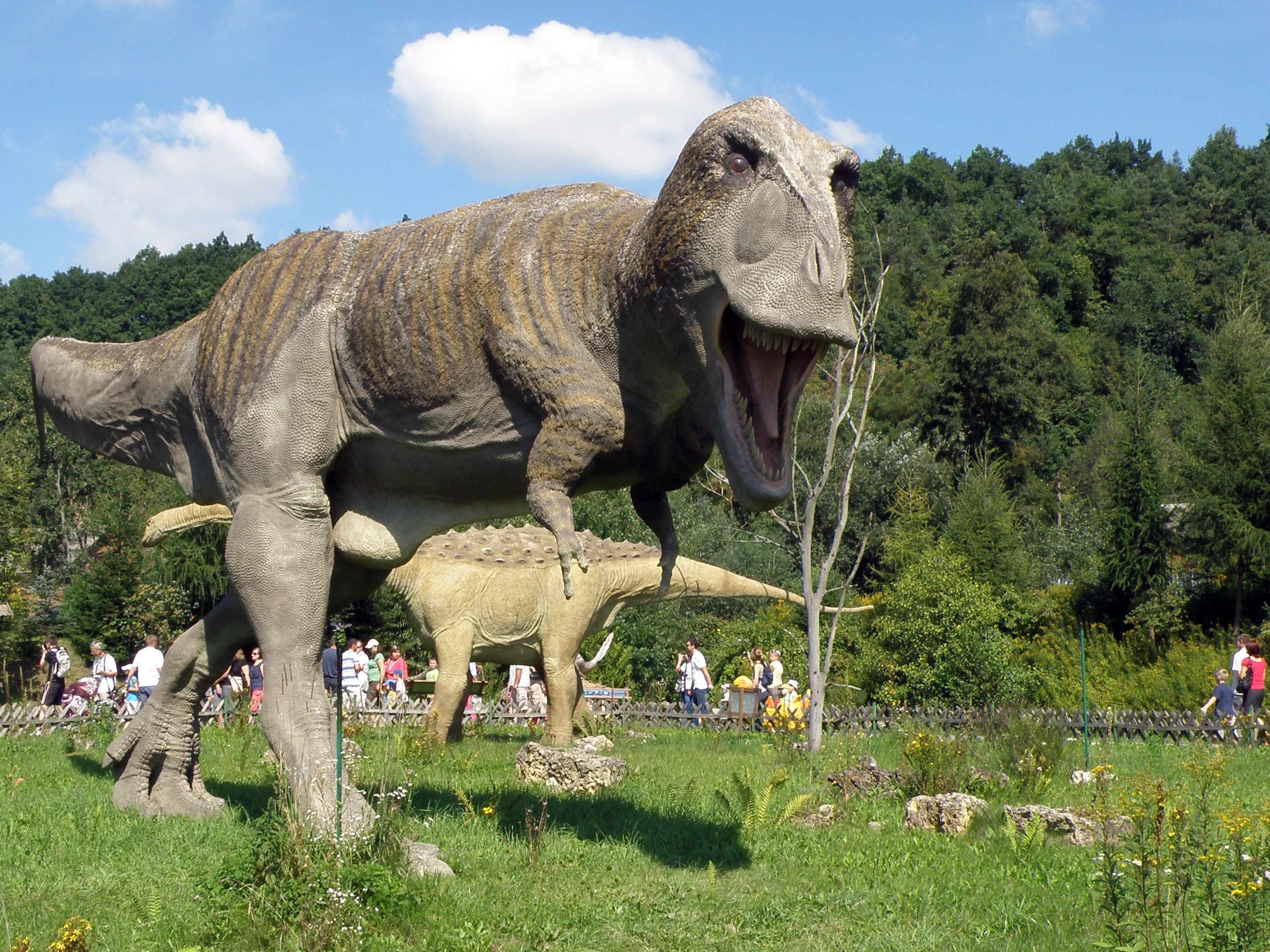 JuraPark Bałtów - Park Dinozaurów - Tyranozaur (Tyrannosaurus)